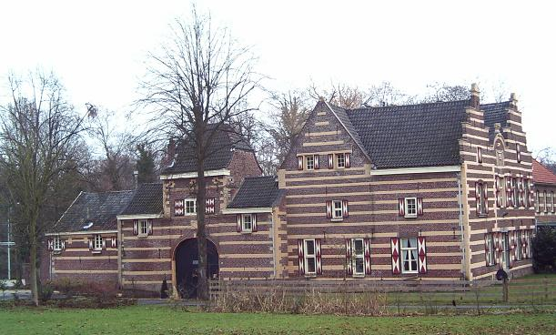 Hoes De Dael, castle, Netherlands